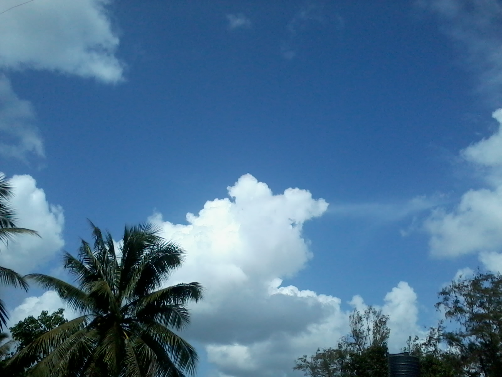 Konkan Region, Photographer-Prathamesh Desai 8-3-1996....Hatkhamba,Ratnagiri.